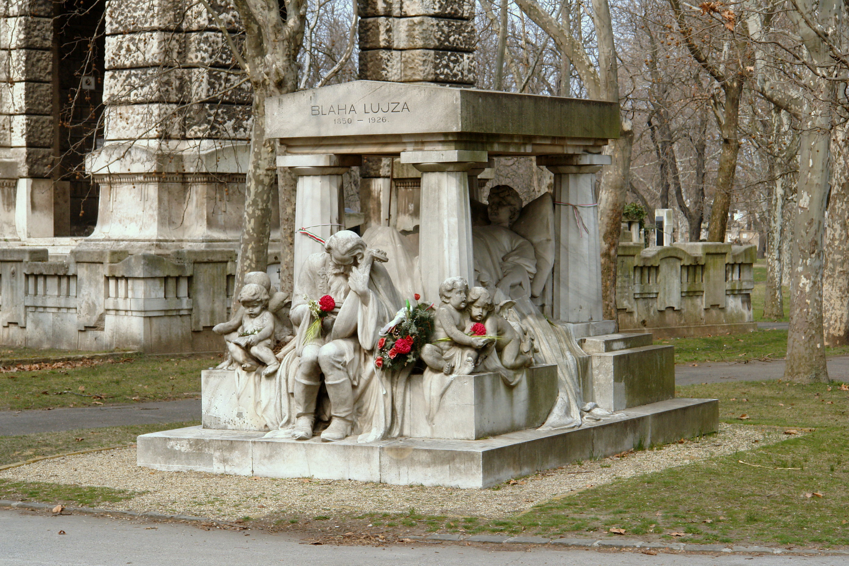 Blaha Lujza síremléke a Fiumei úti Sírkertben (Kerepesi temetőben), Budapest VIII. kerület, Fiumei út 16. This is a photo of a monument in Hungary. Identifier: 90002